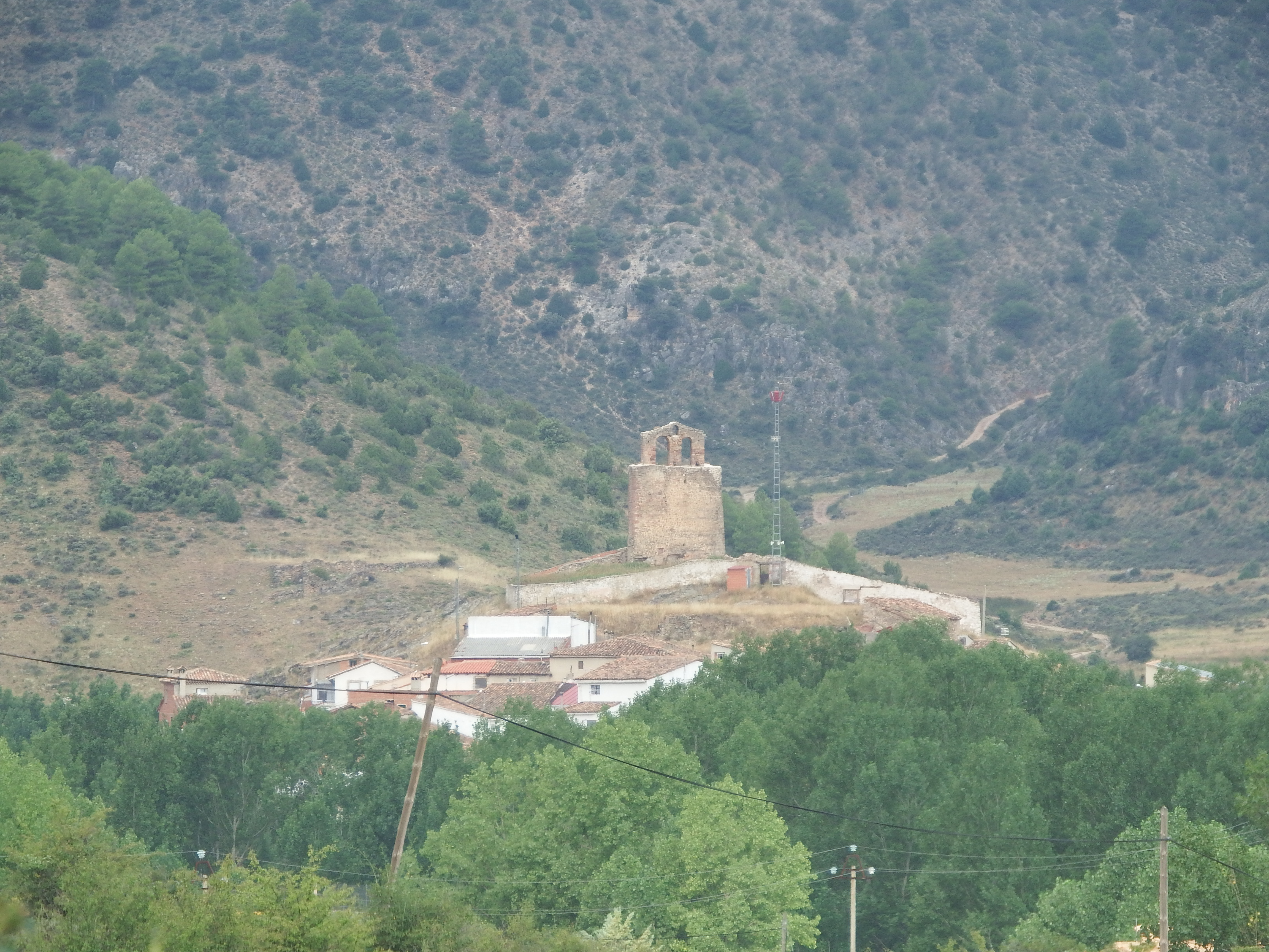 Valdemoro-Sierra, vista general del pueblo.